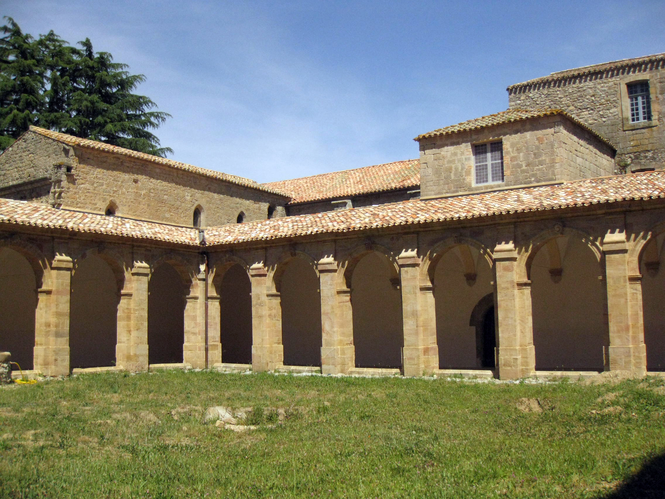 Antiga abadia Sainte-Marie d'Orbieu (La Grassa)